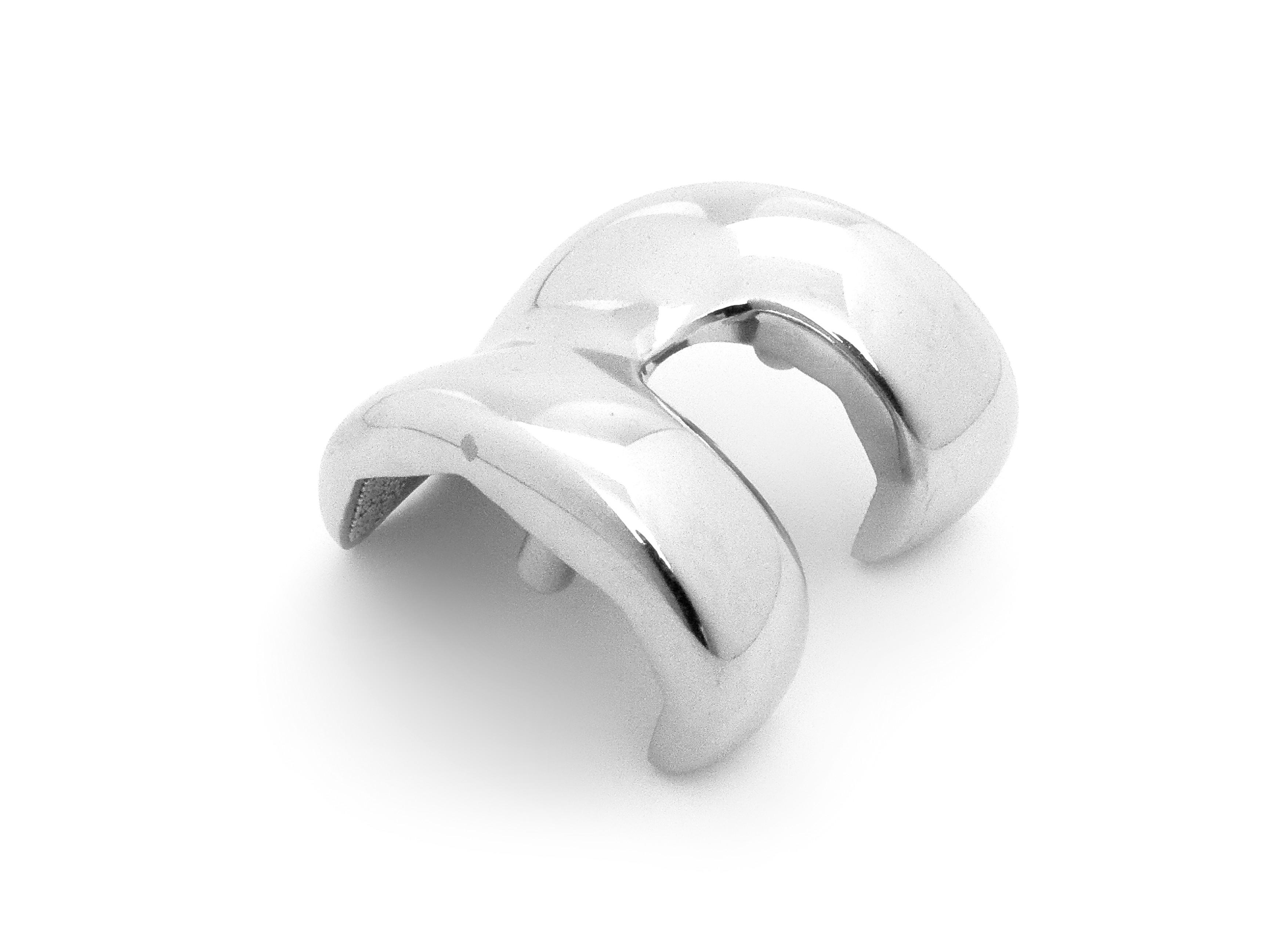 Zdravotnictví - Kolenní náhrady